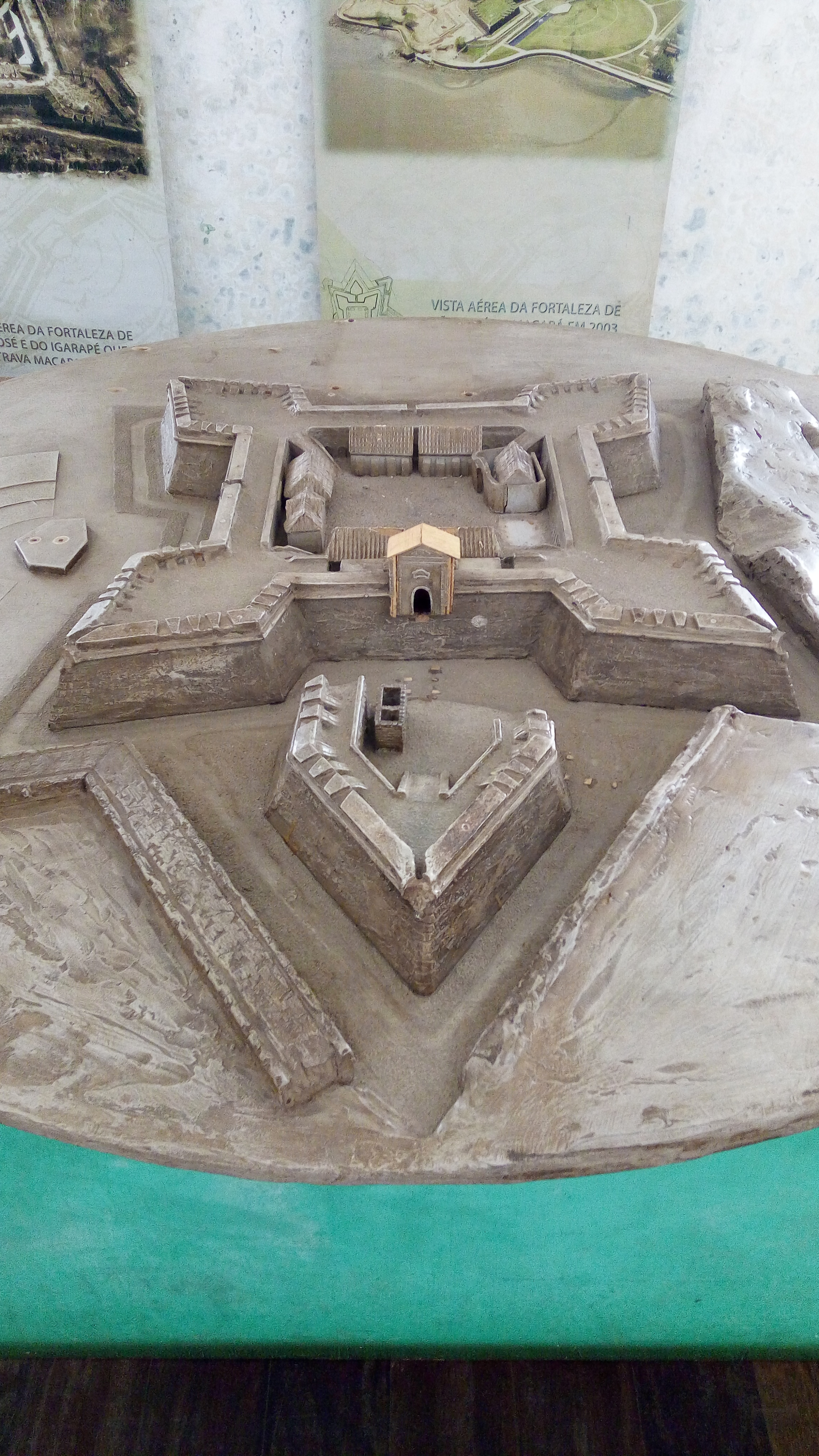 Maquete da Fortaleza de São José de Macapá antes da reforma. Em exposição para visitantes no museu dentro da fortificação.